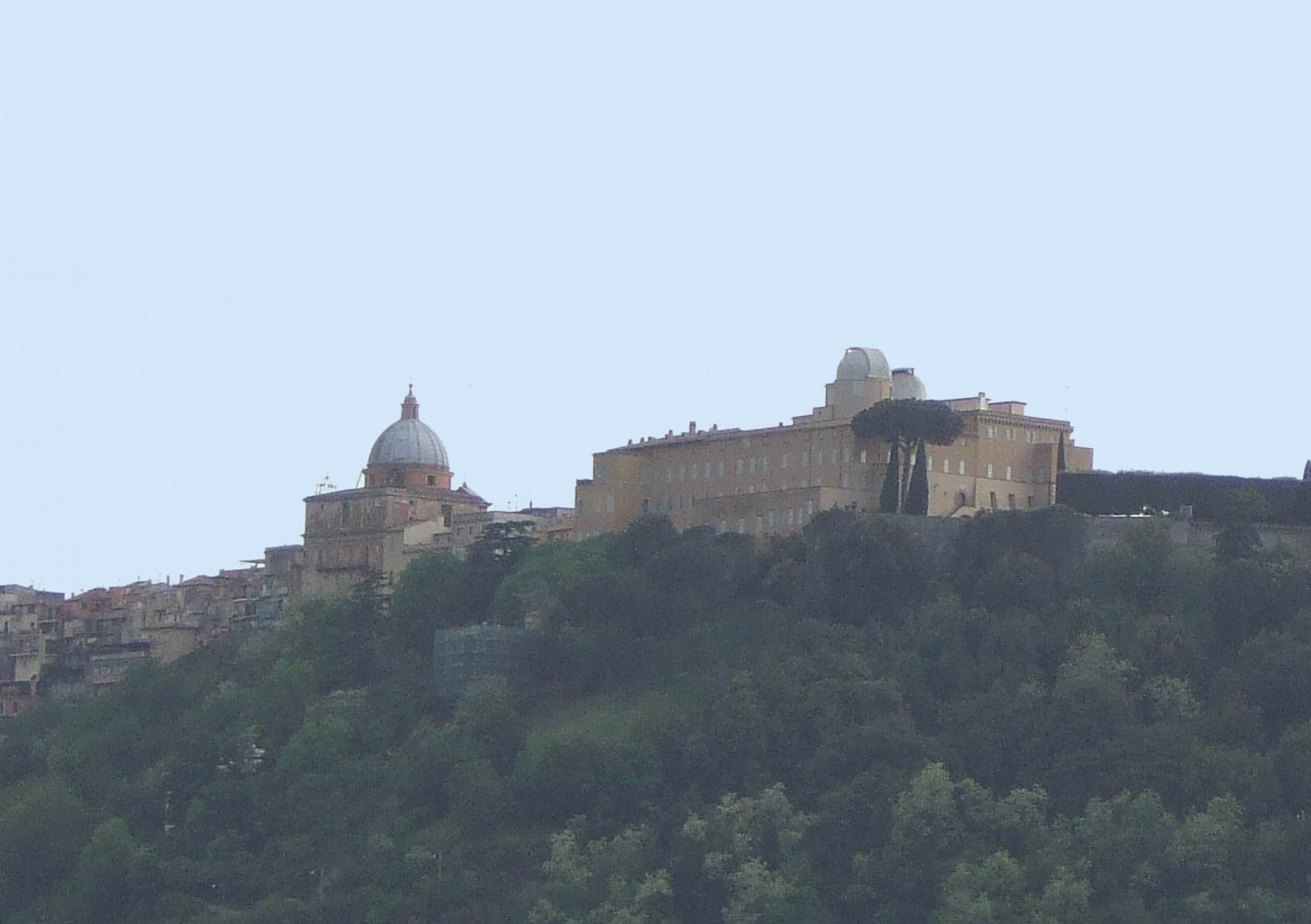 Castel Gandolfo, Pfarrkirche San Tommaso da Villanova (links) und Sommerresidenz des Papstes (rechts)